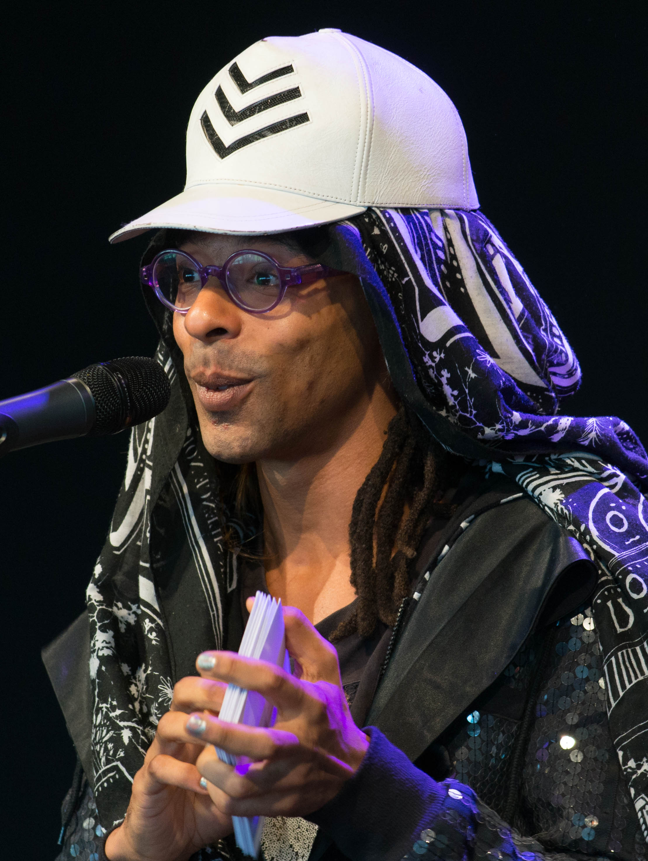 Makode Linde i en manifestation till stöd för hotade konstnärer och författare på Kulturhuset Stadsteatern i Stockholm den 14 februari 2015.